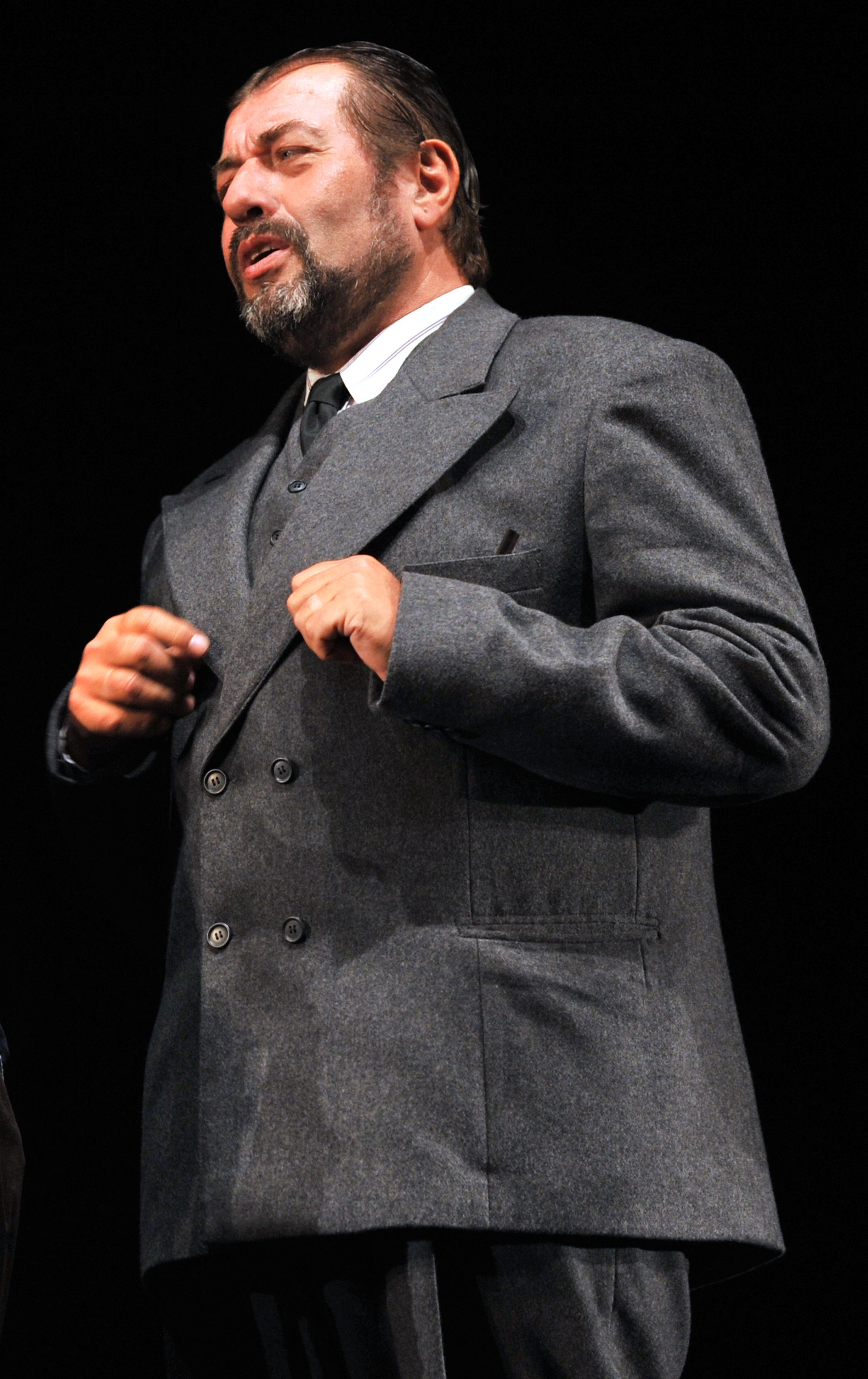 Zdeněk Junák